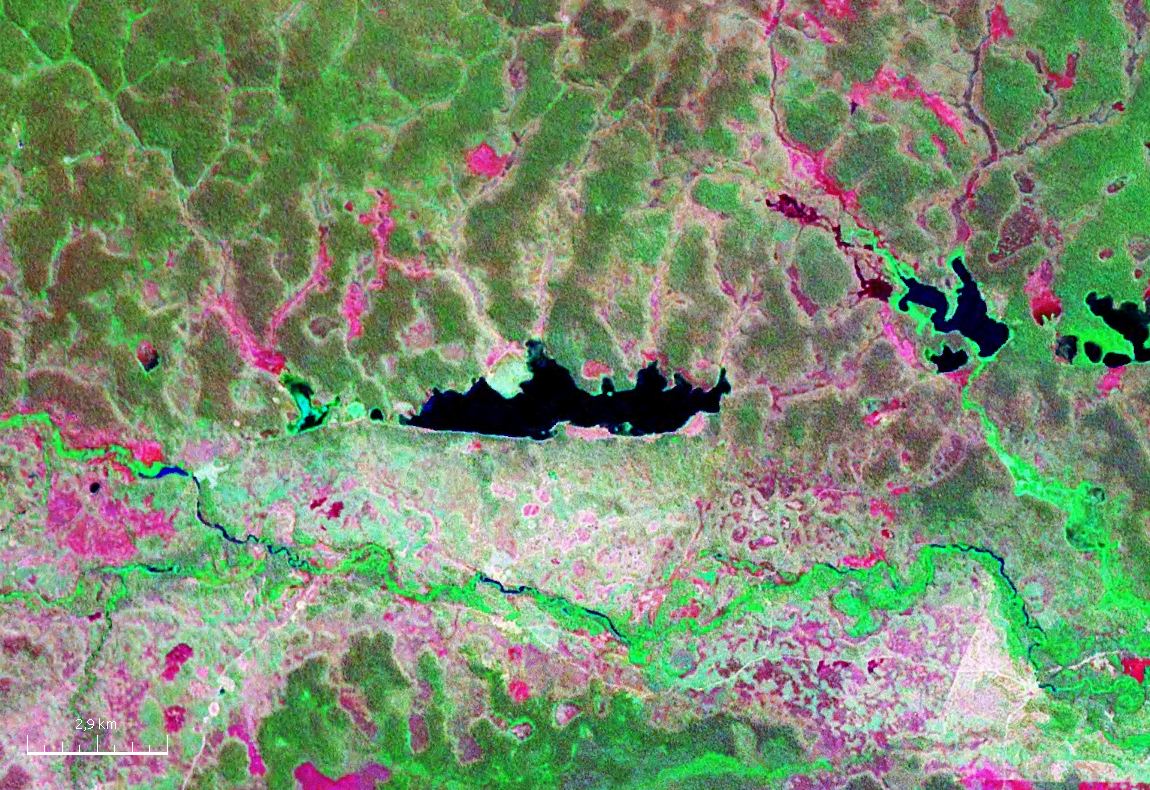 Vista satelital de la laguna Bahia Toco ubicada en el departamento de Santa Cruz (Bolivia).